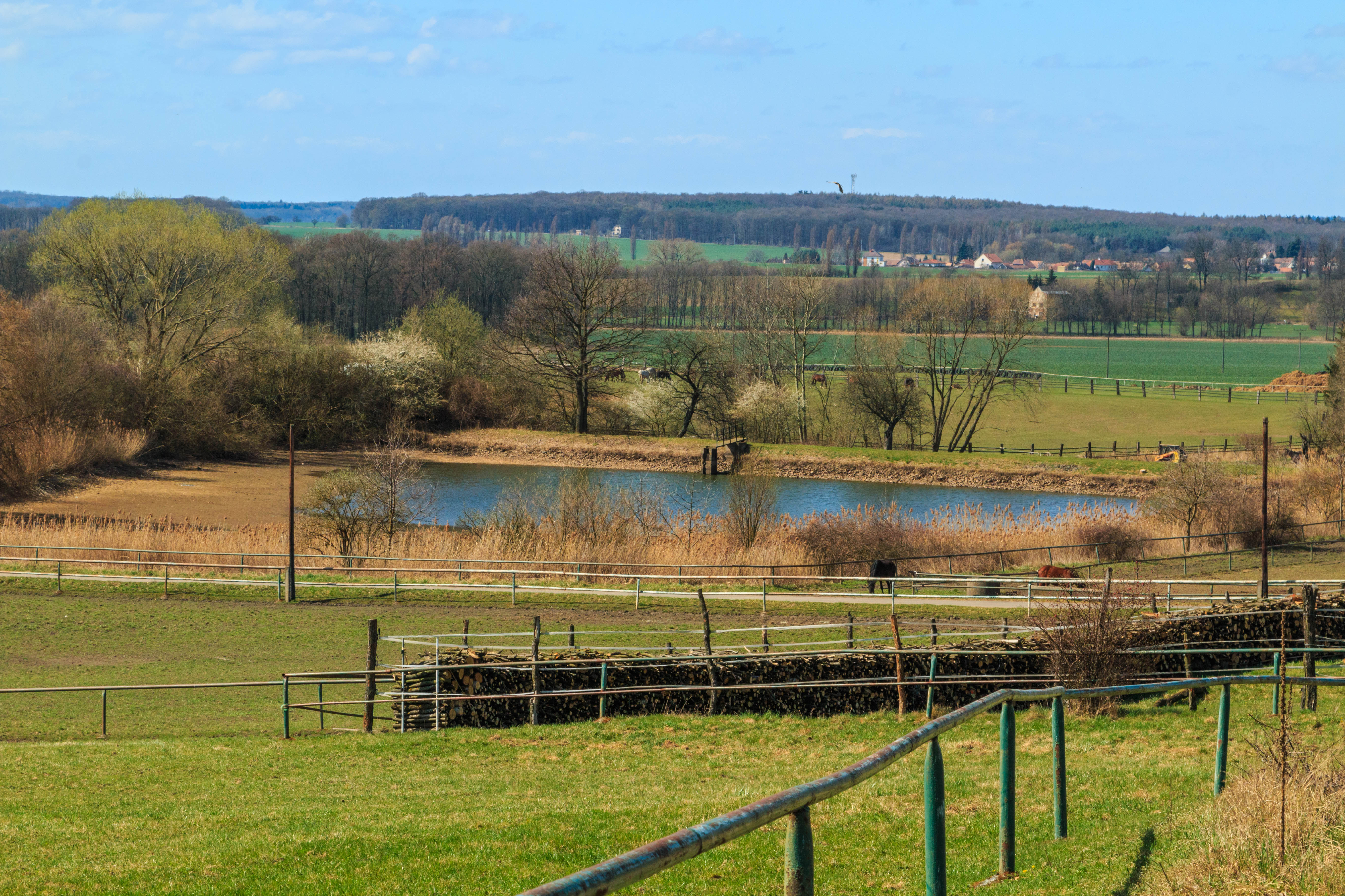 Hořejší rybník u Měníku Project: Vodstvo.